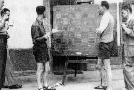 From PlanetMath under GNU Free Document and